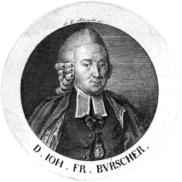 Johann Friedrich Burscher (1732-1805) Protestant theologian from Germany